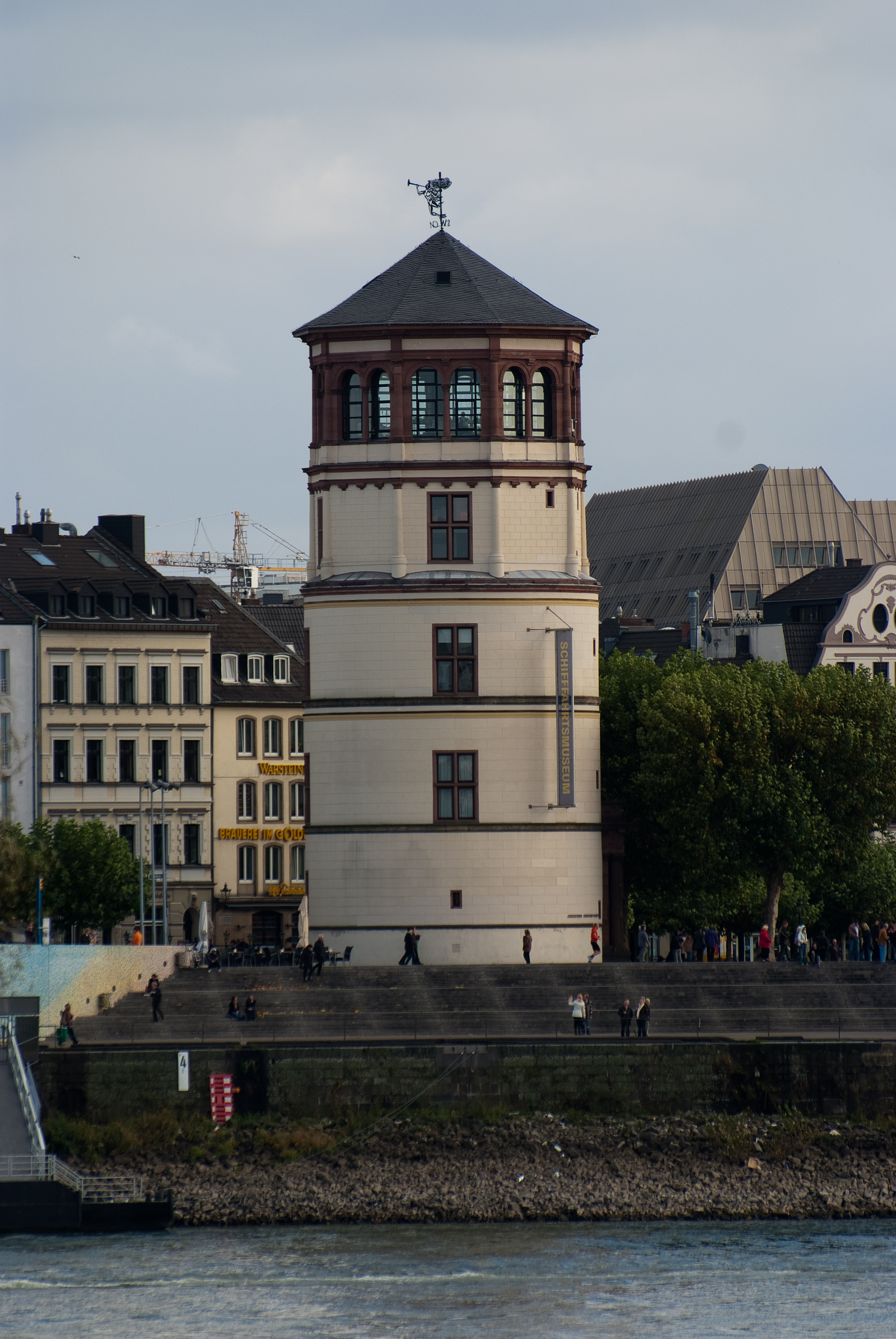 Schlossturm Düsseldorf, gesehen vom gegenüberliegenden Rheinufer